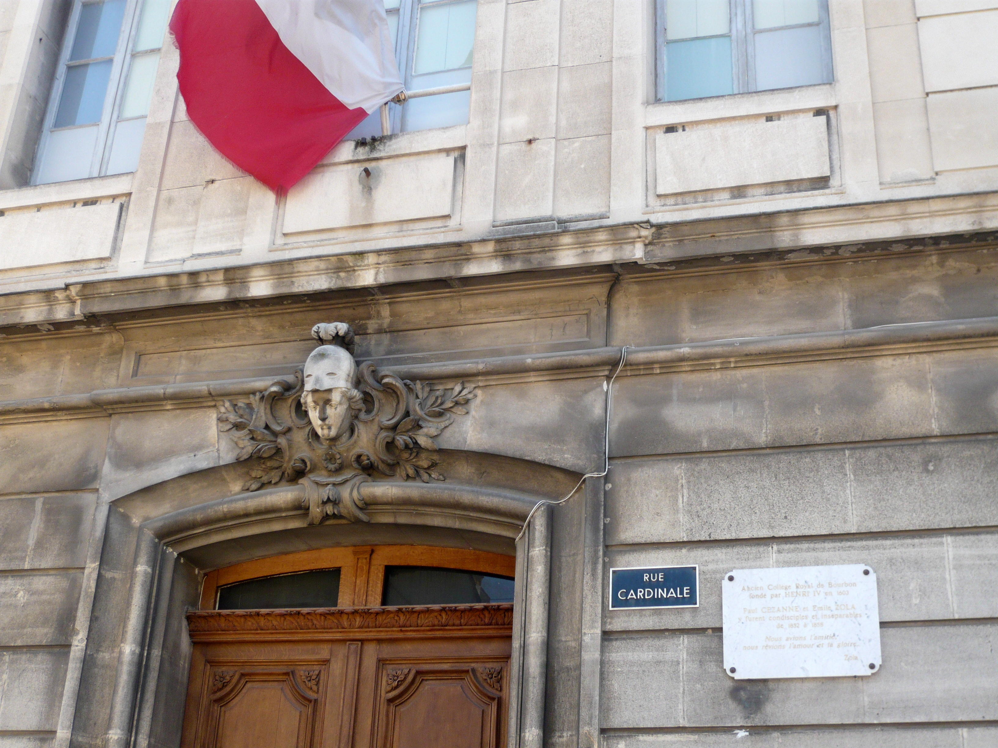 Collège Mignet, 41 rue Cardinale, Aix-en-Provence (France). Mascaron et plaque commémorative. « Ancien Collège Royal de Bourbon fondé par Henri IV en 1603. Paul Cézanne et Émile Zola y furent condisciples et inséparables de 1852 à 1858. Nous avions l'amitié, nous rêvions l'amour et la gloire. Zola »